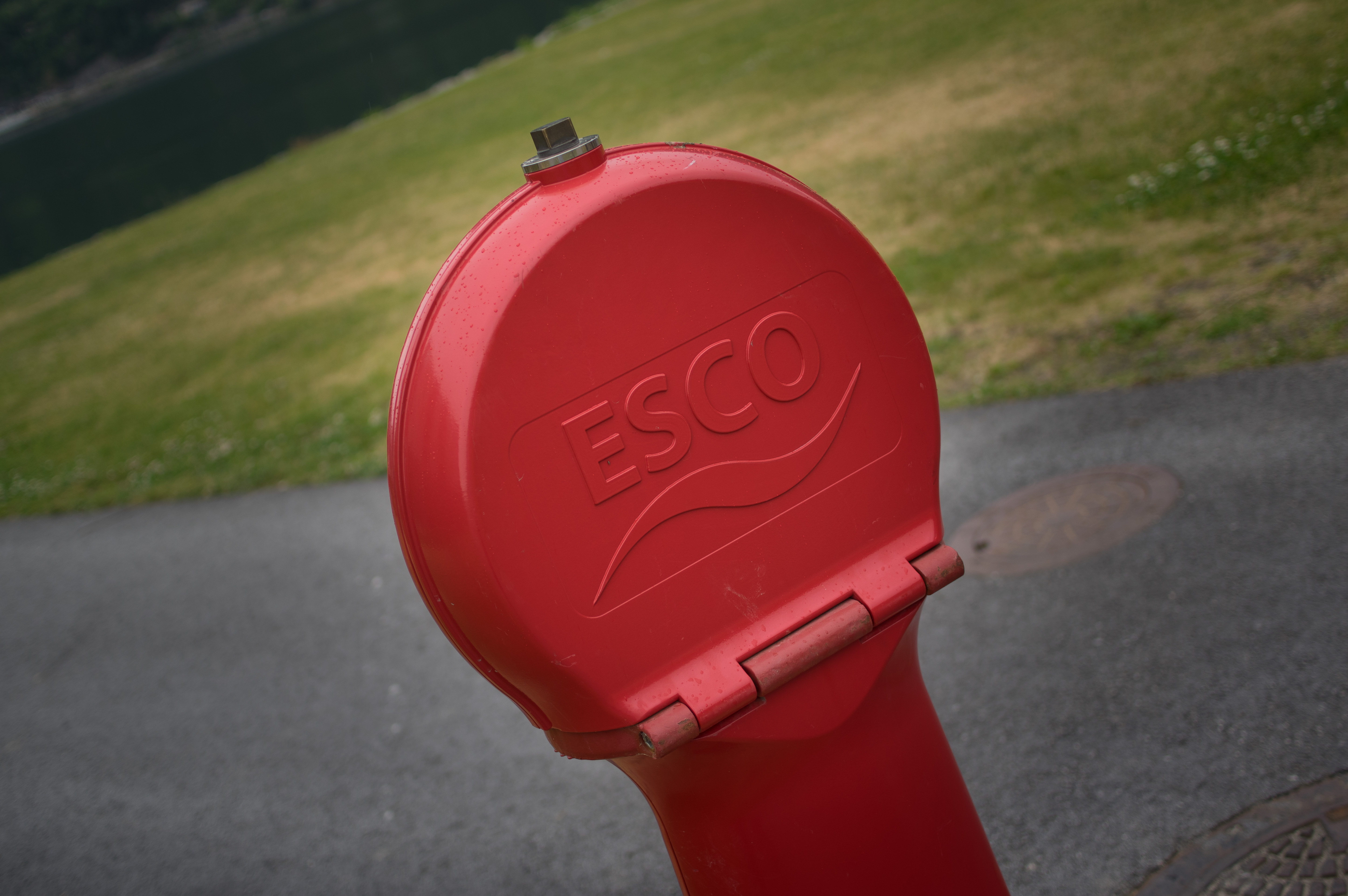 Rød Ulefos Esco brannhydrant.